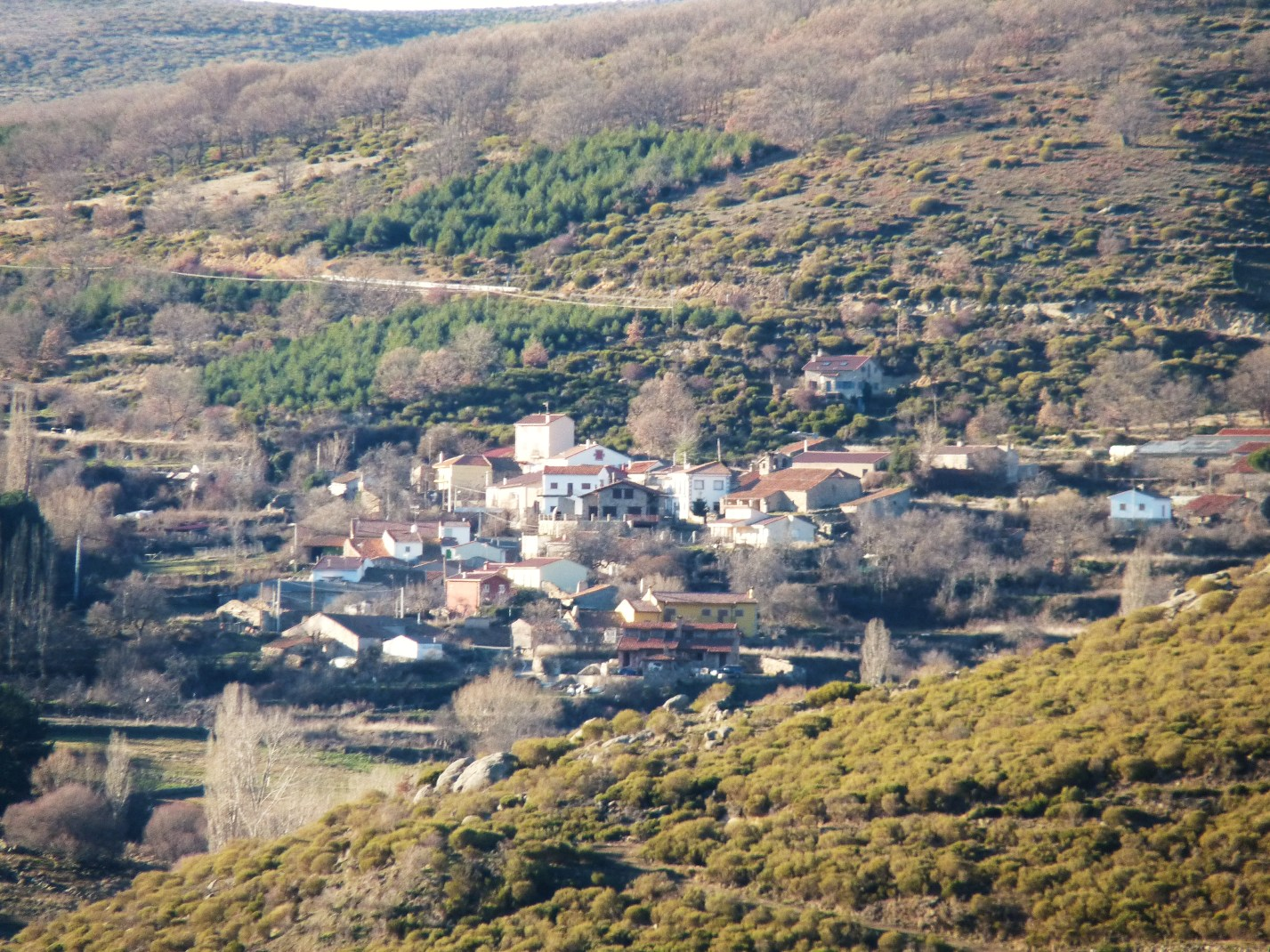 Vista de Hoyos del Collado desde Hoyos del Espino (Castilla y León, España).